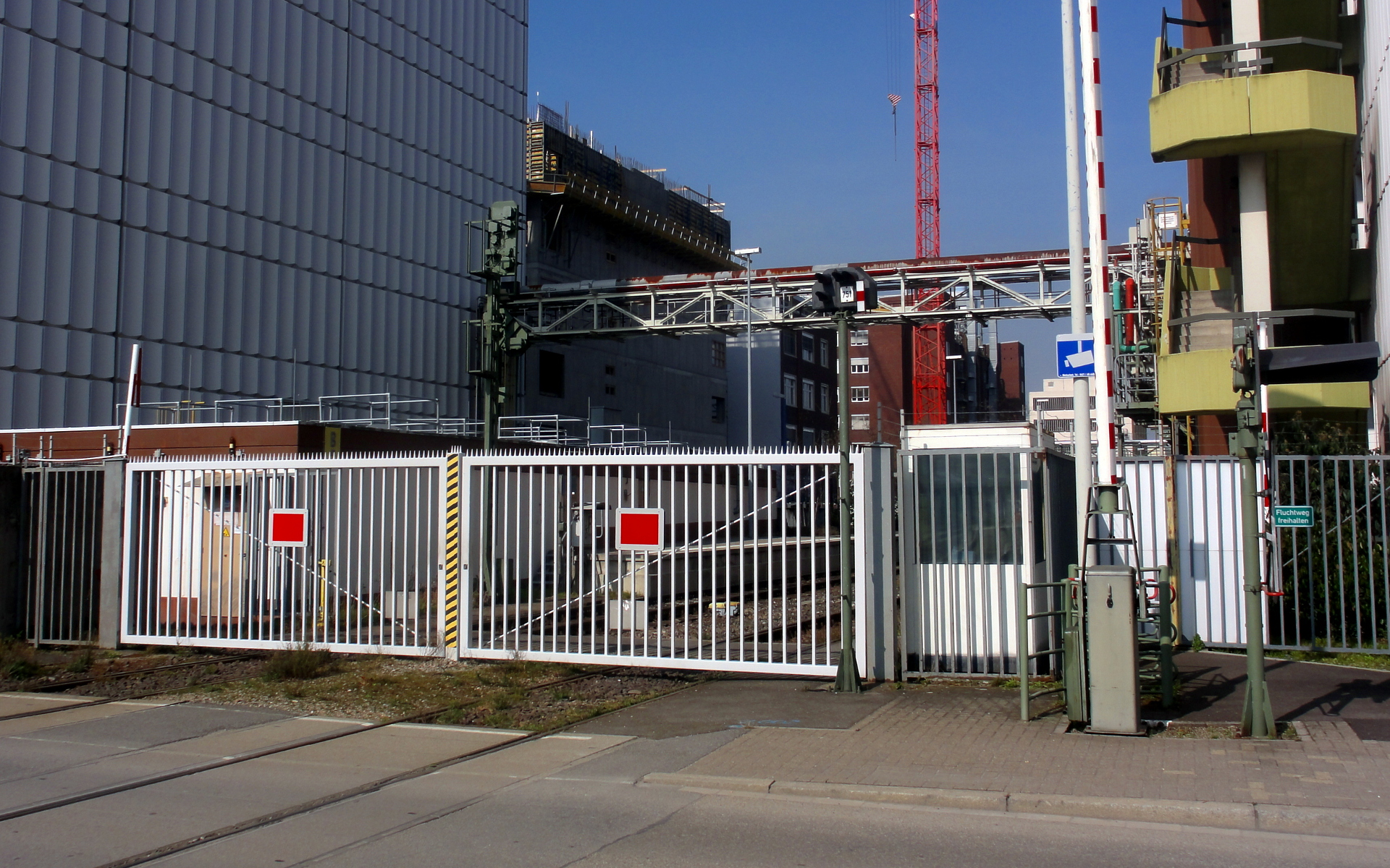 Südliches Werkstor 7a der BASF Ludwigshafen.